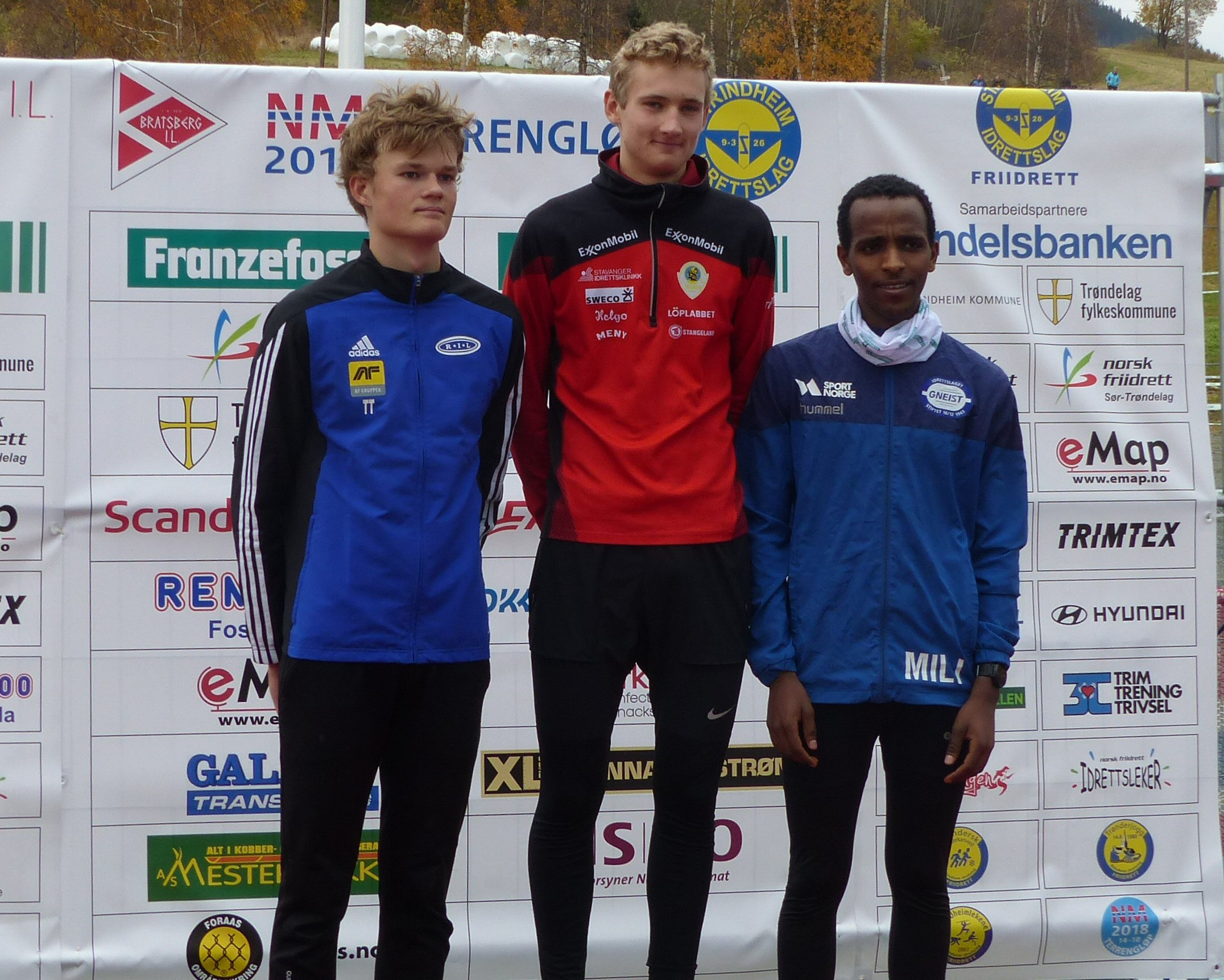 NM i terrengløp, lang løype, Bratsberg - Trondheim, 2018. Seierspallen for klassen G17.